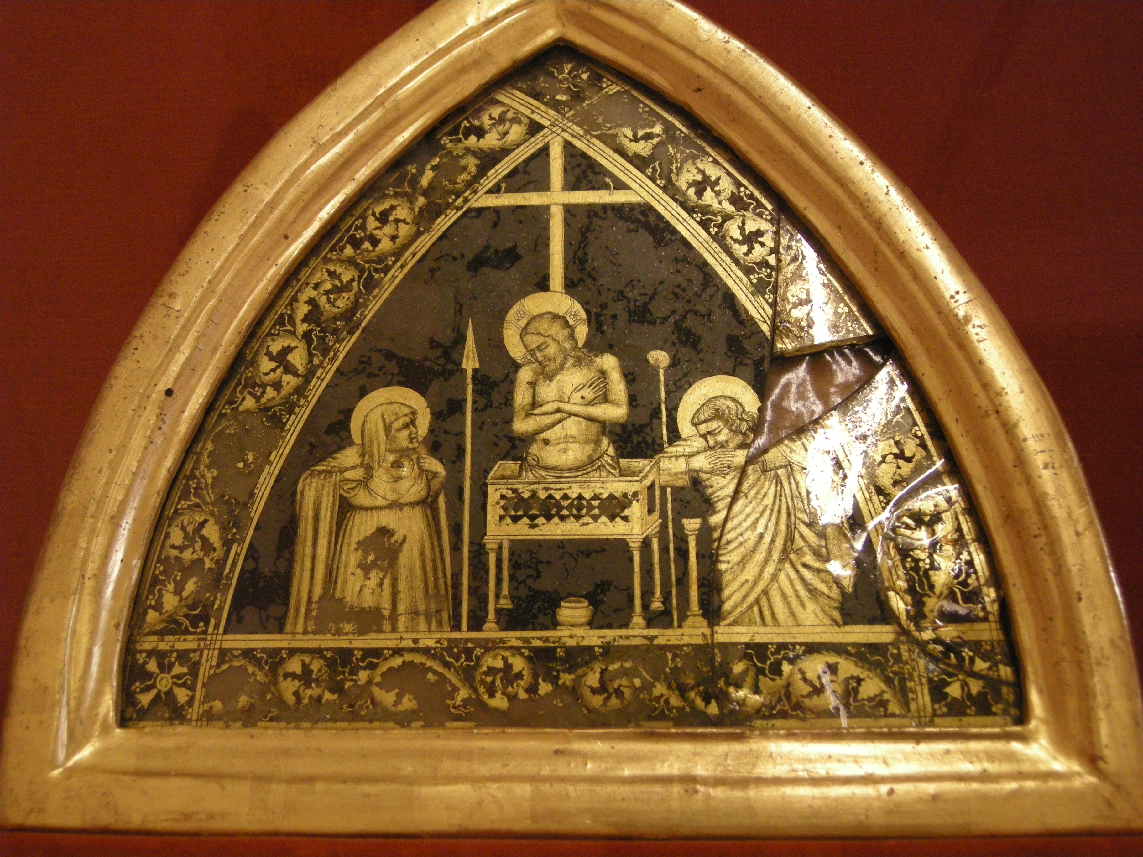 Bottega di giotto, cristo in pietà tra la vergine e san giovanni